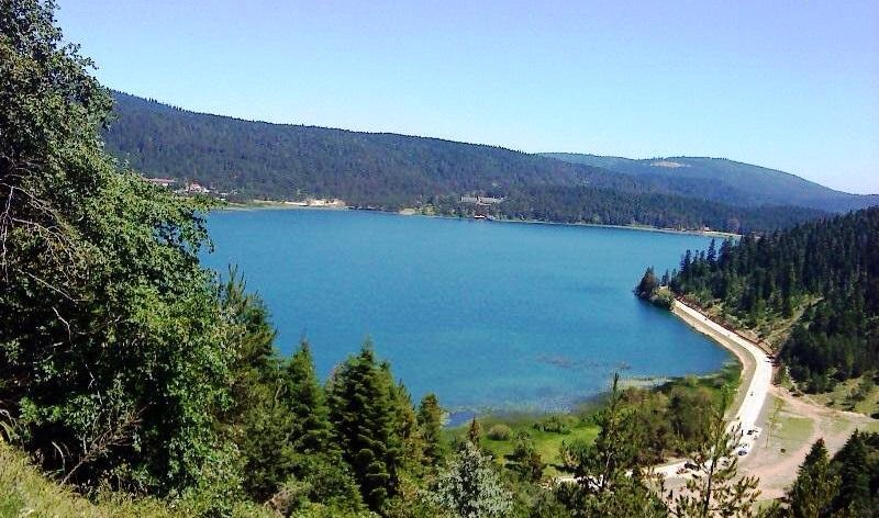 sapanca صبنجة او سبانجا